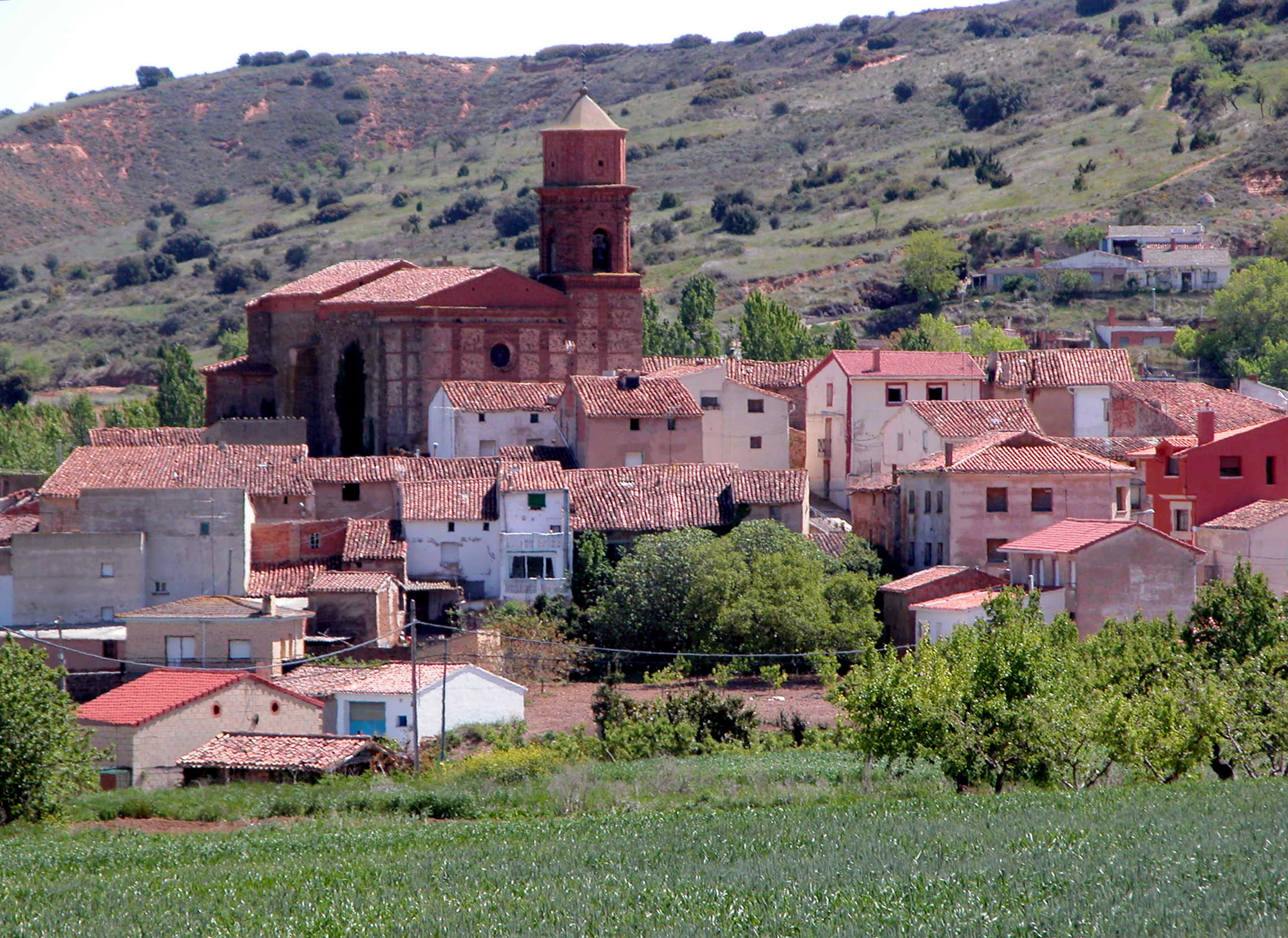 Los Molinos de Ocón, aldea de Ocón (La Rioja - España)